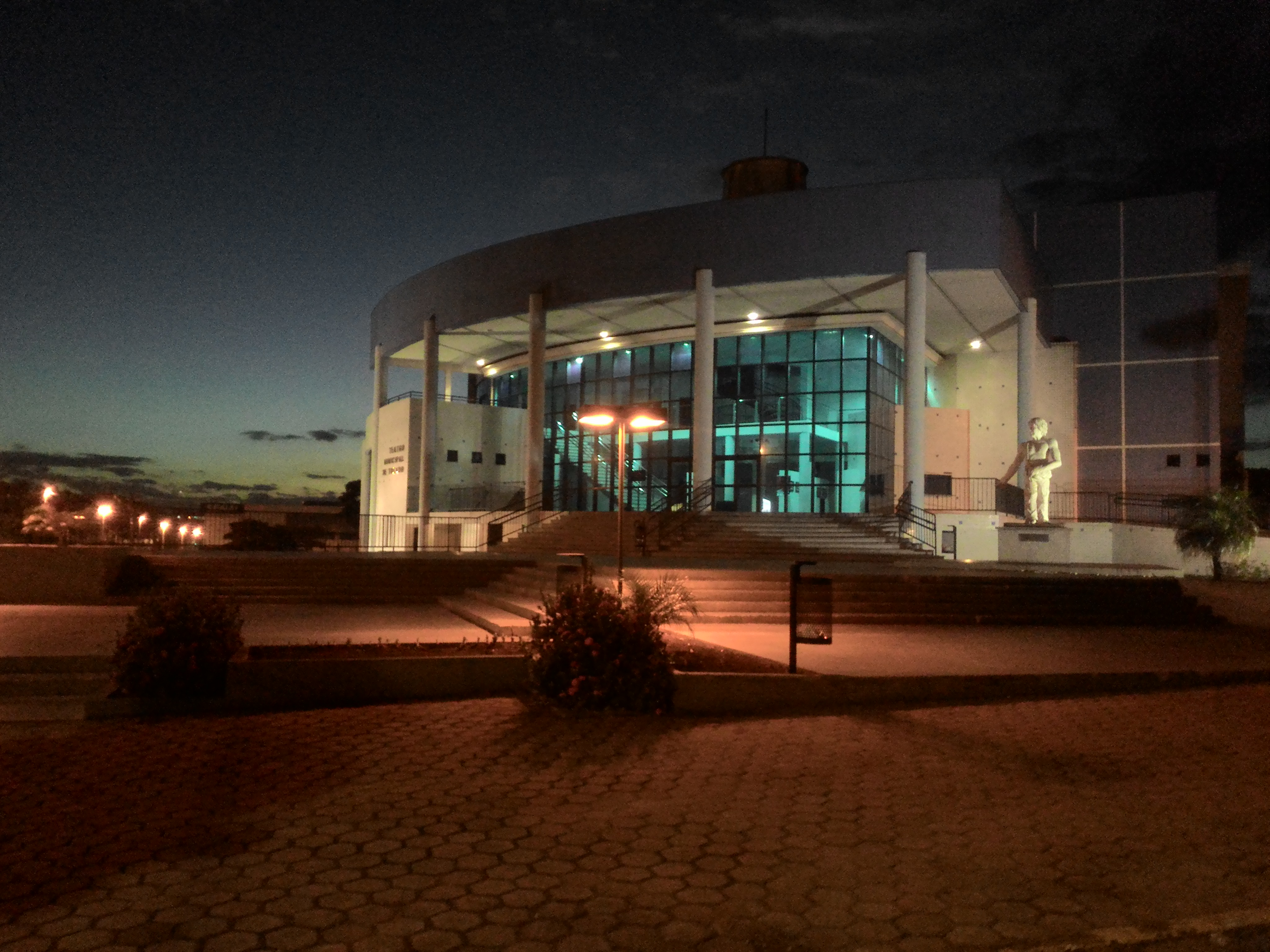 Teatro Municipal de Toledo